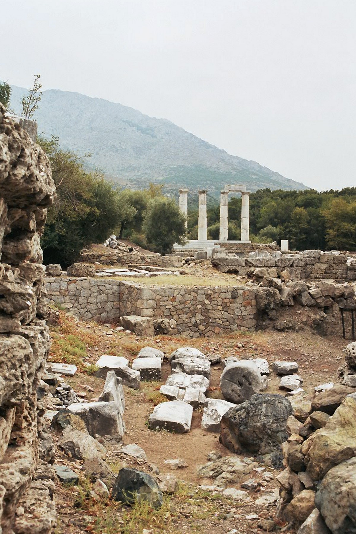 Samothrace (Grèce), Sanctuaire des grands Dieux